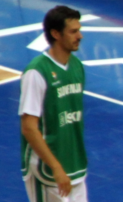 Jurica Golemac at Slovenia - Croatia at Eurobasket 2009